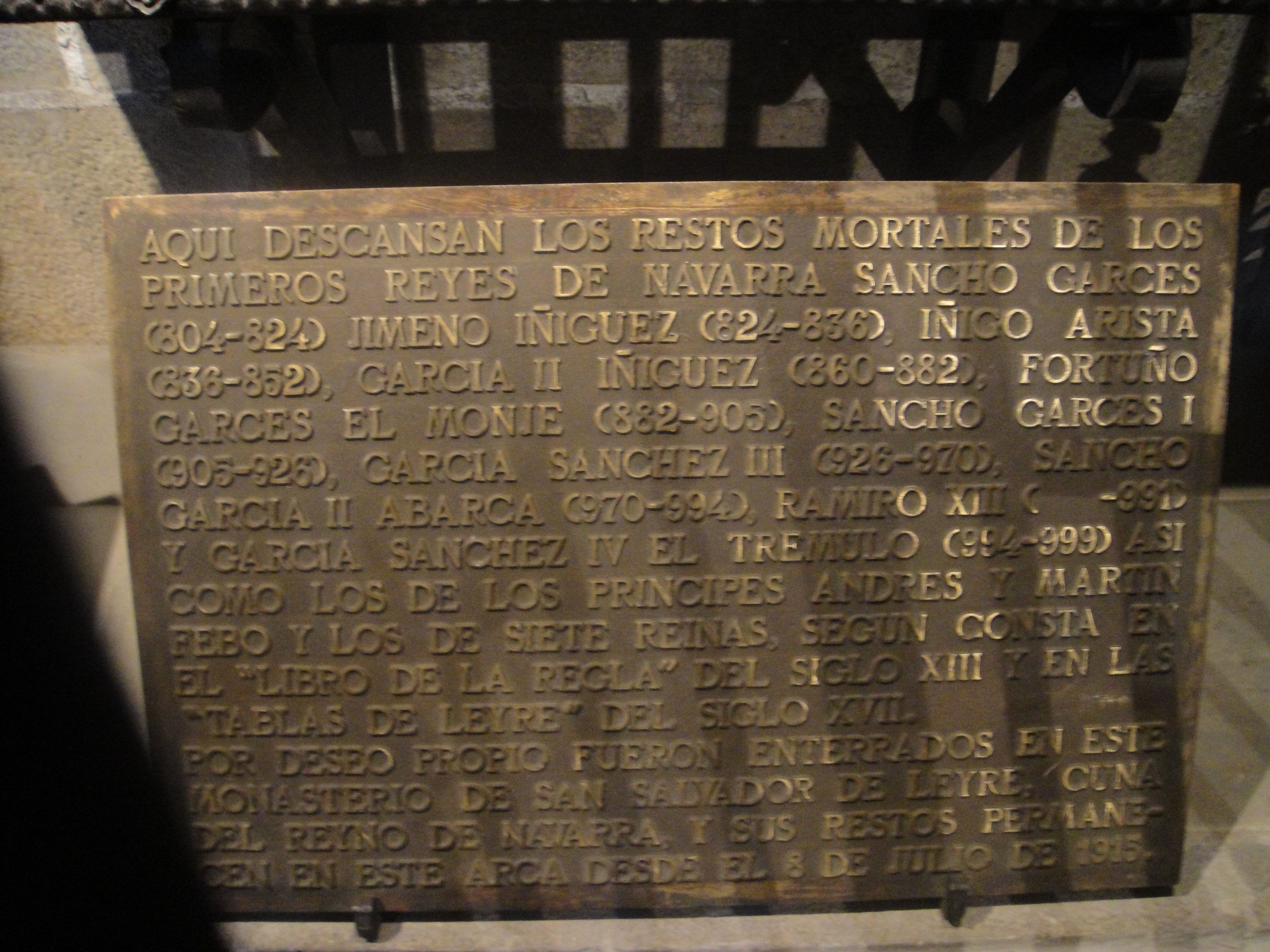 Placa con los nombres de los monarcas sepultados en el monasterio de San Salvador de Leyre. Navarra, (España).